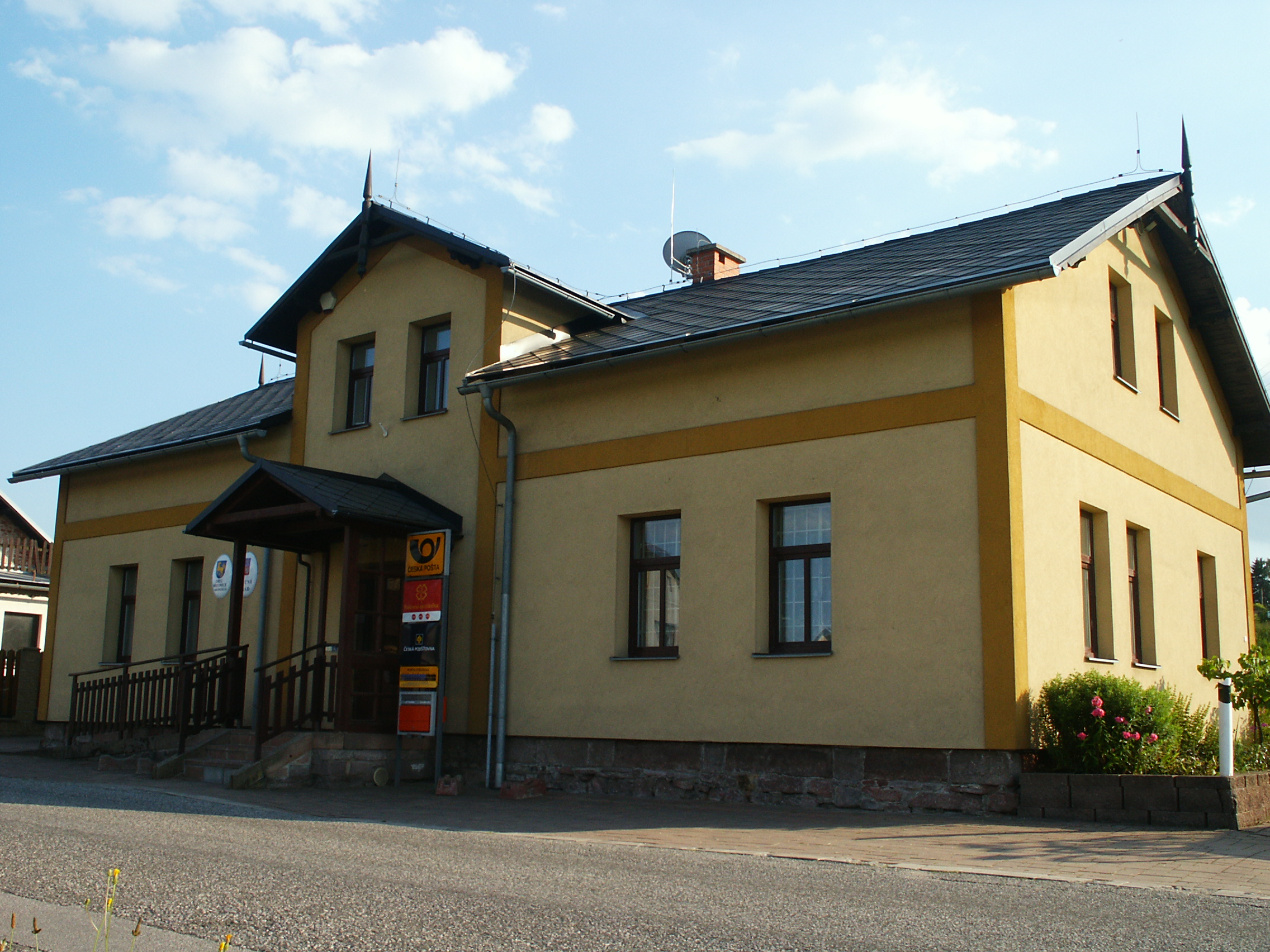 Martinice - pošta a obecní úřad